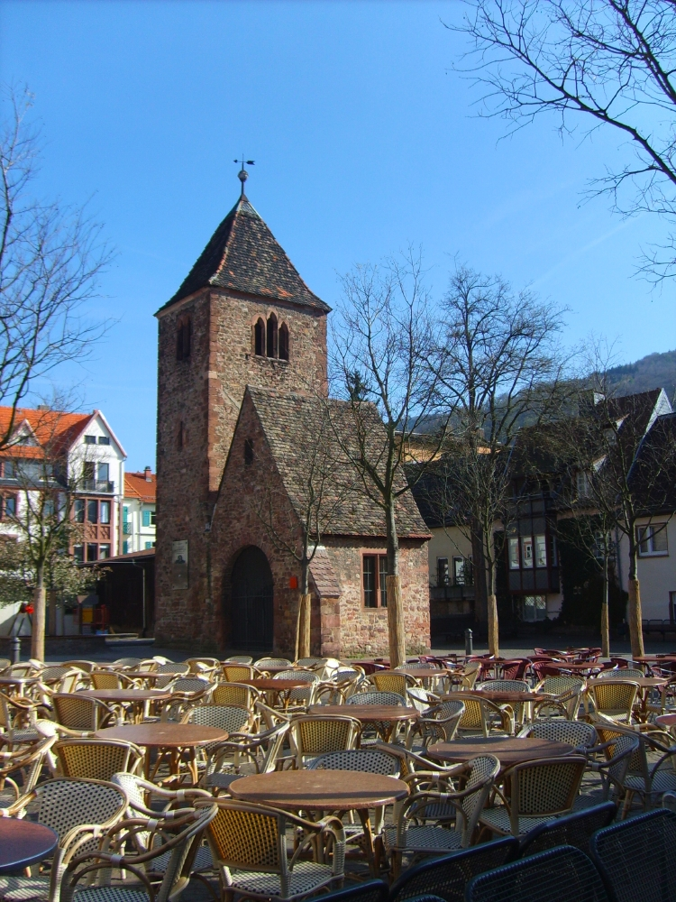 Marktplatz, Neuenheim, Heidelberg, Germany